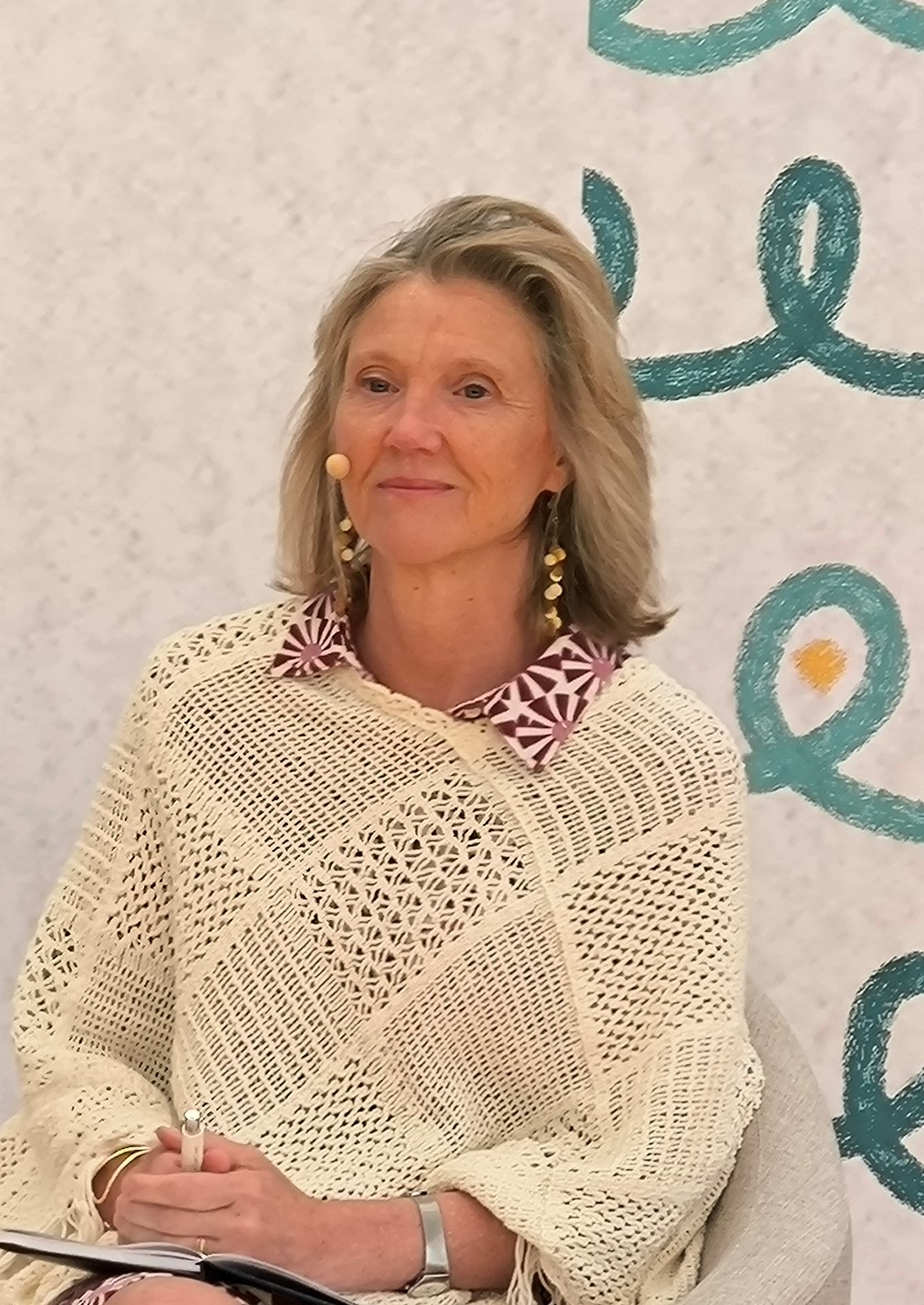 Cristina Sánchez-Andrade, escritora.